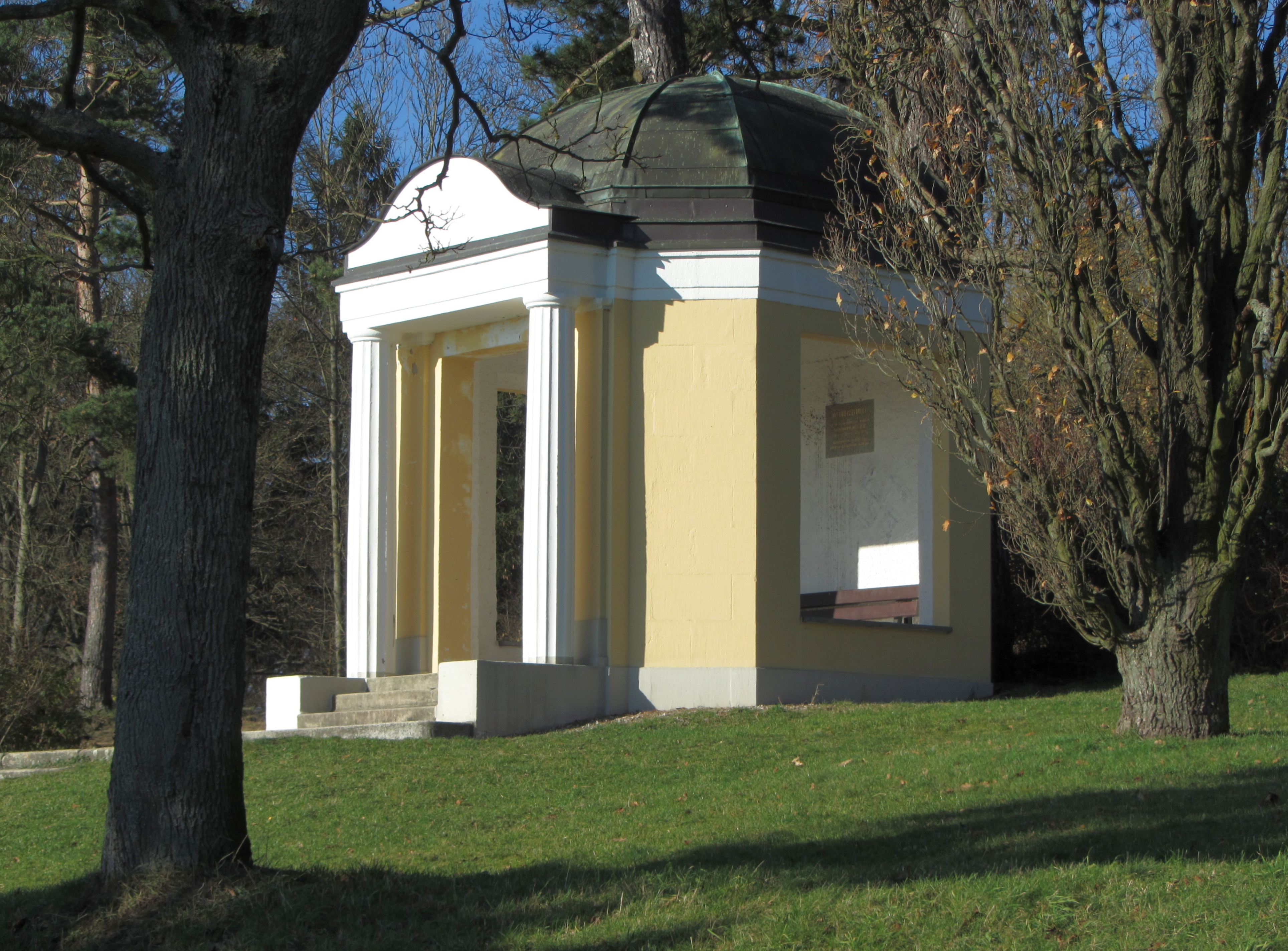 Weisheitstempel in Hof/S.